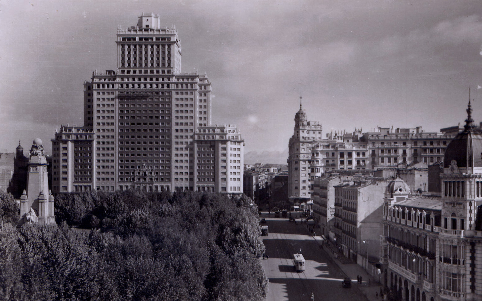 Edificio España, en Madrid, década de los cincuenta